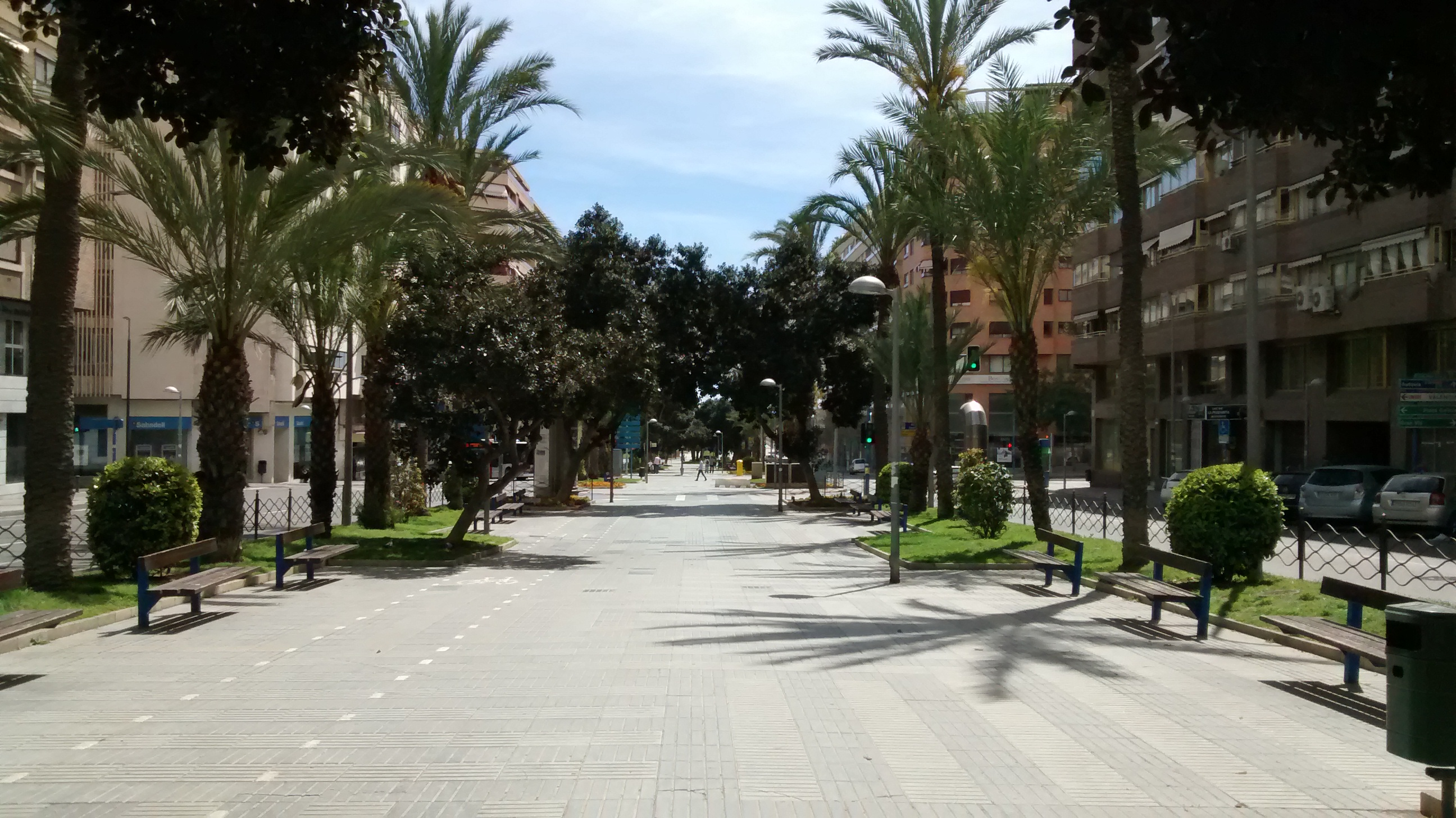 Avenida Óscar Esplá de Alicante (hacia el sur).